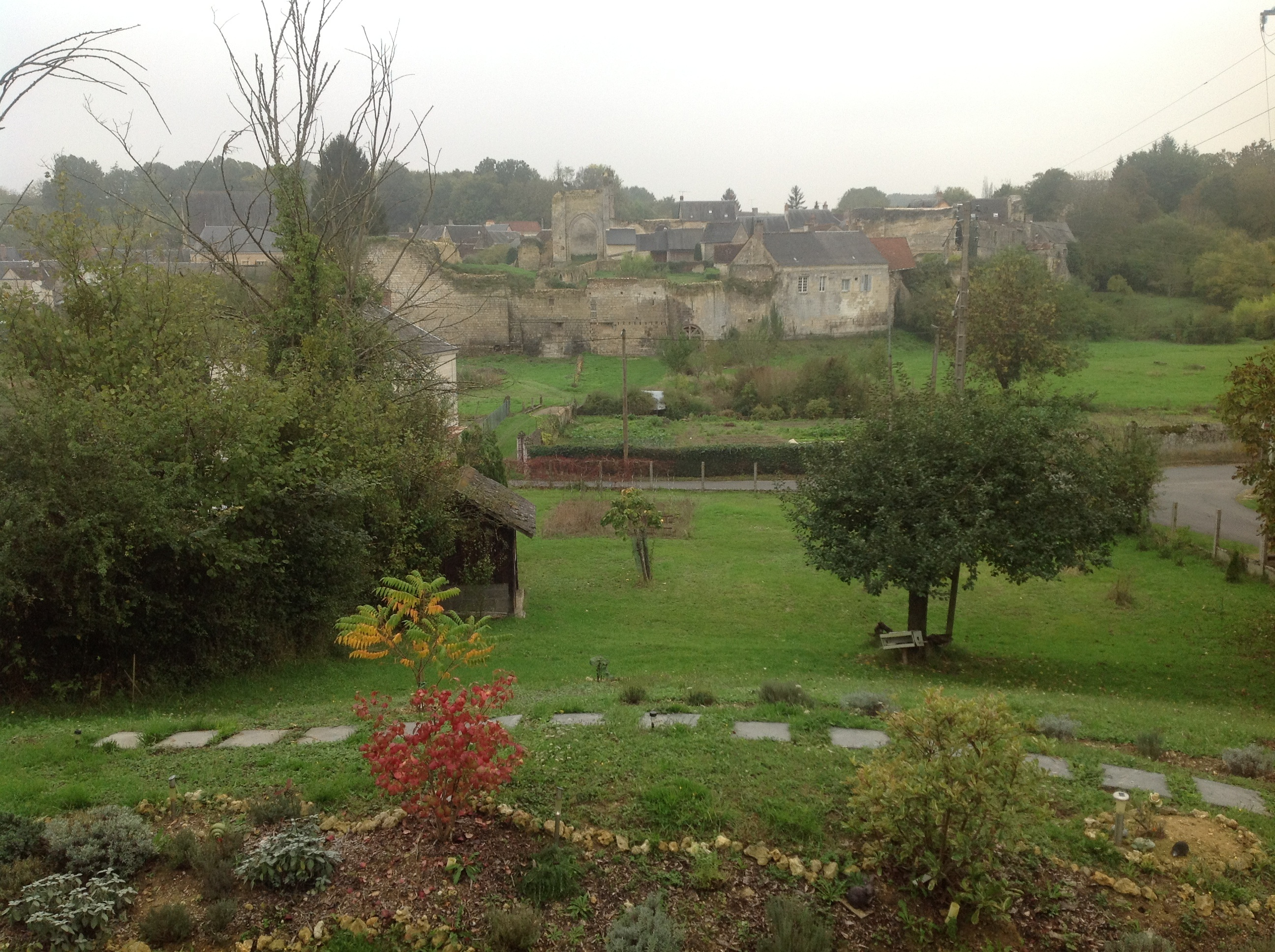 Un joli village du centre de la France